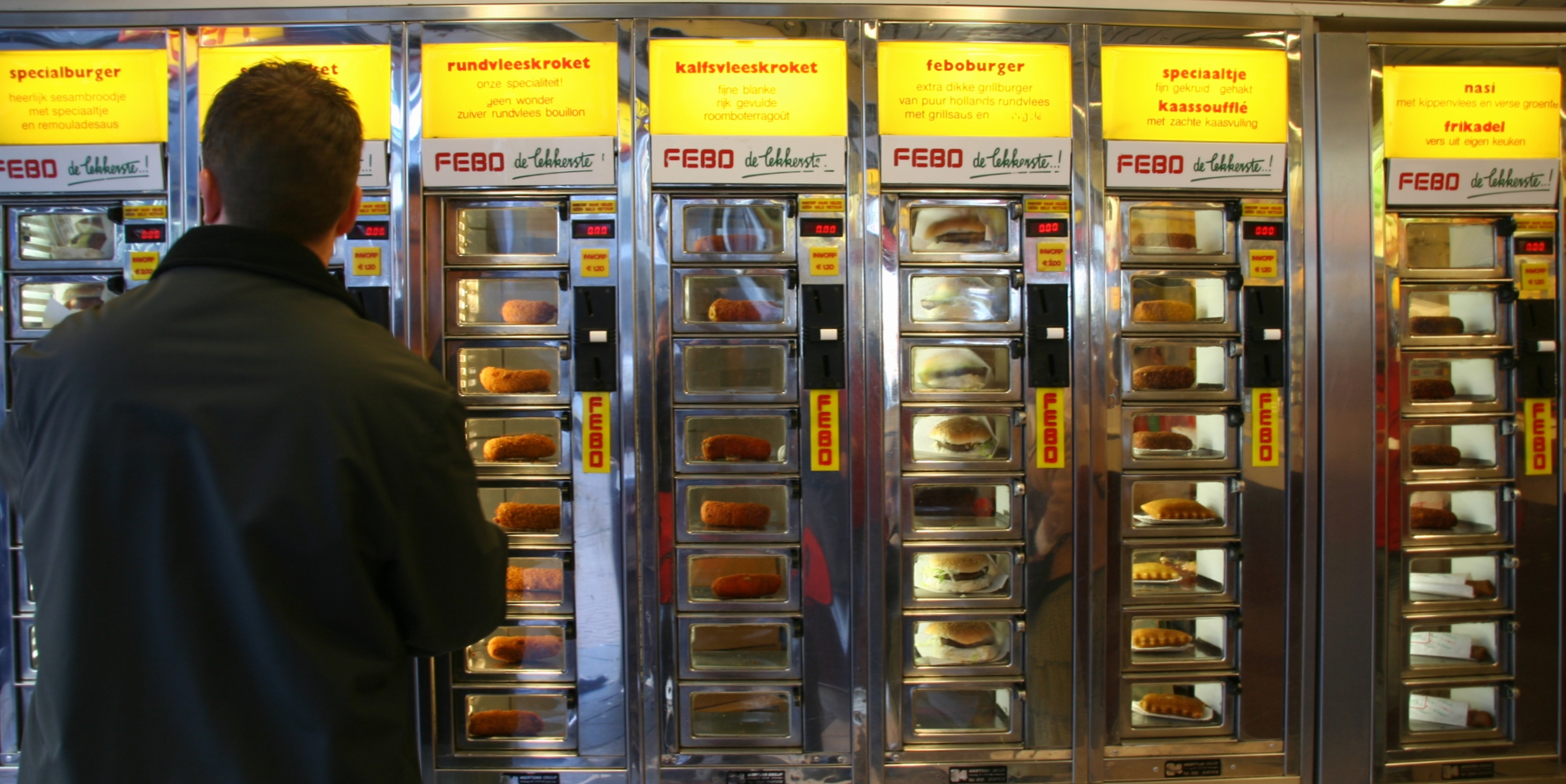 FEBO vending machines